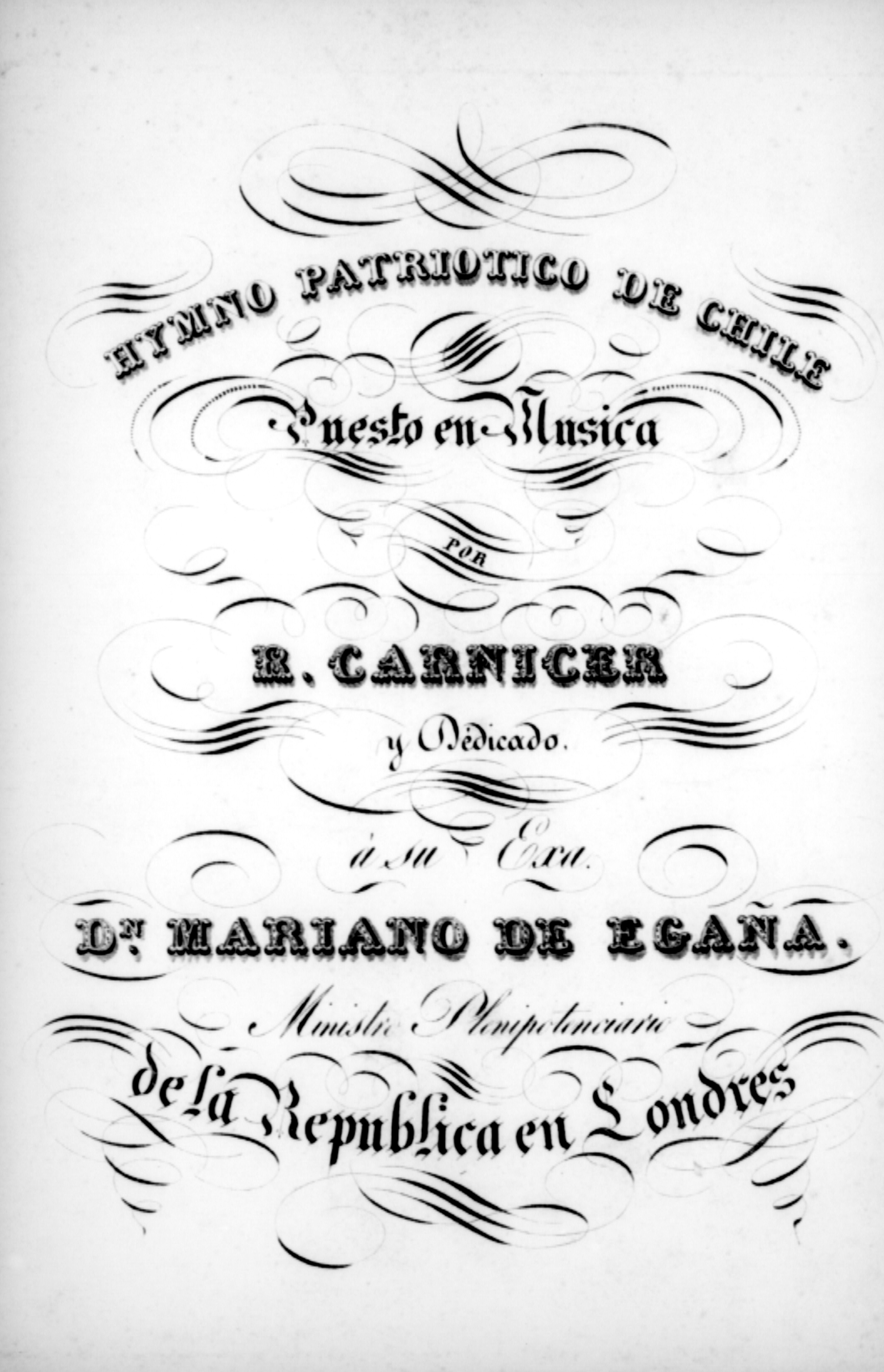 Fotografía en blanco y negro de la portada de un escrito original del himno patrio de Chile. El texto está escrito con letra manuscrita y dice: "Himno patriótico de Chile, puesto en música por R. Carnicer y dedicado a su excelencia don Mariano Egaña, ministro plenipotenciario de la república en Londres".